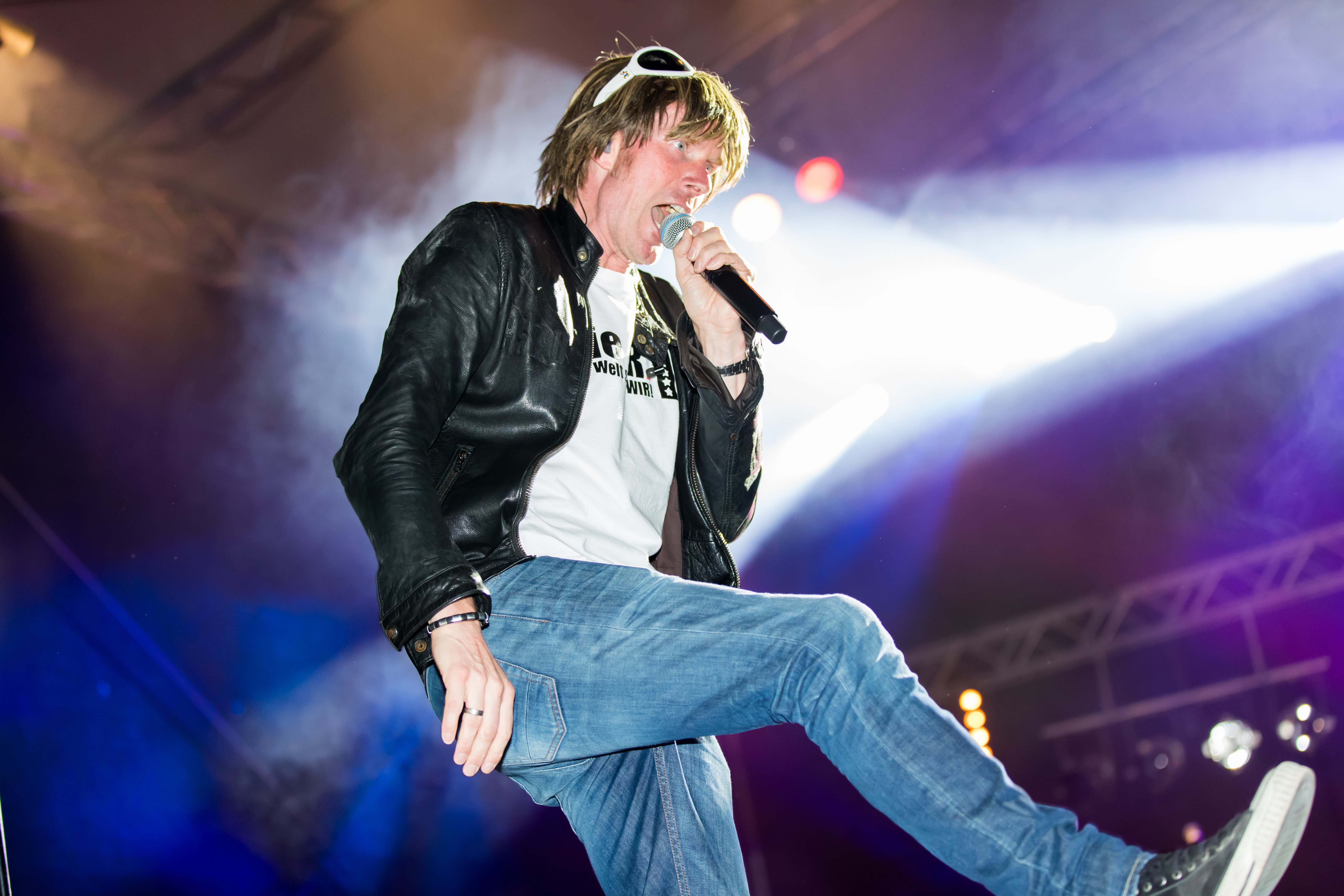 Mickie Krause during La Ola Mannheim at Maimarktgelände, Mannheim, Baden Württemberg, Germany on 2016-07-09, Photo: Sven Mandel